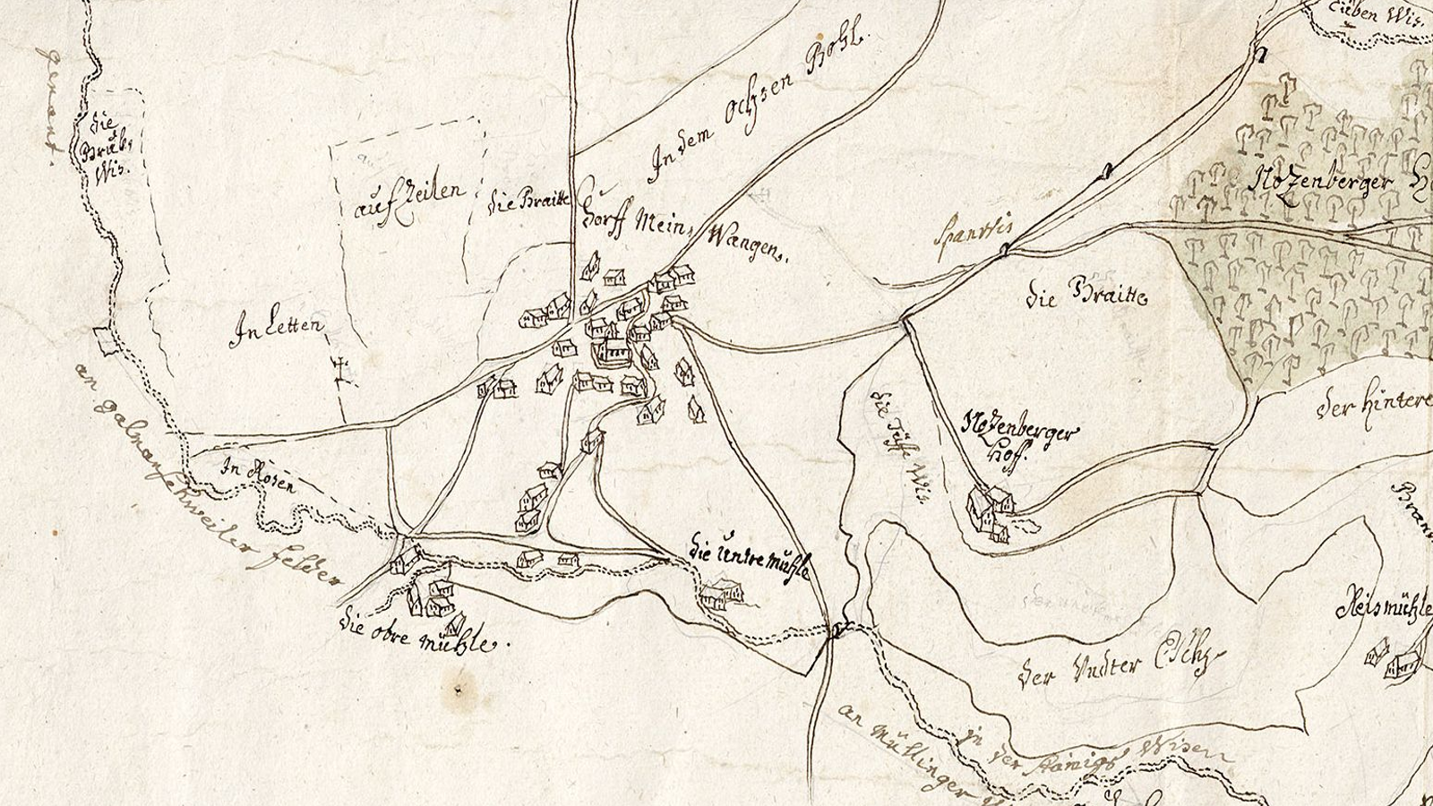 Deutschland (D) - Baden-Württemberg (BW) - Landkreis Konstanz (KN) - Mühlingen: Mainwangen in einer Karte von 1765 (Ausschnitt)